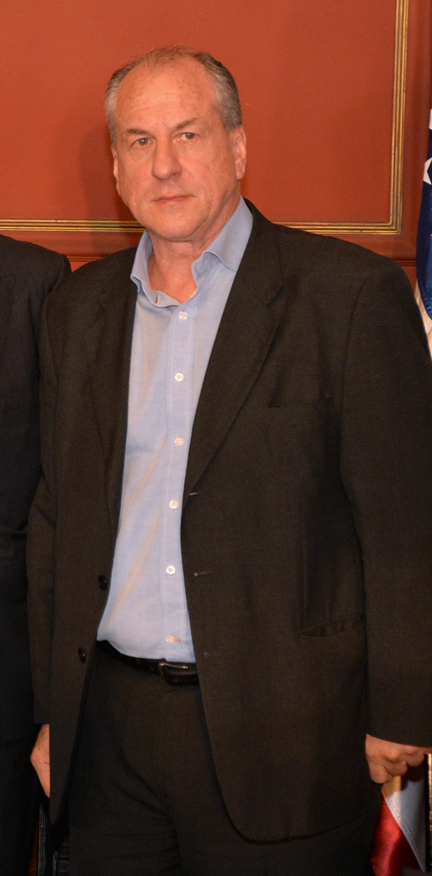 La Embajadora de los Estados Unidos de América en Uruguay, Kelly Keiderling, y el Ministro de Trabajo y Seguridad Social, Ernesto Murro, firmaron hoy un importante convenio en materia de seguridad social. [U.S. Embassy photo: Juan Francisco Casal / Copyright info]